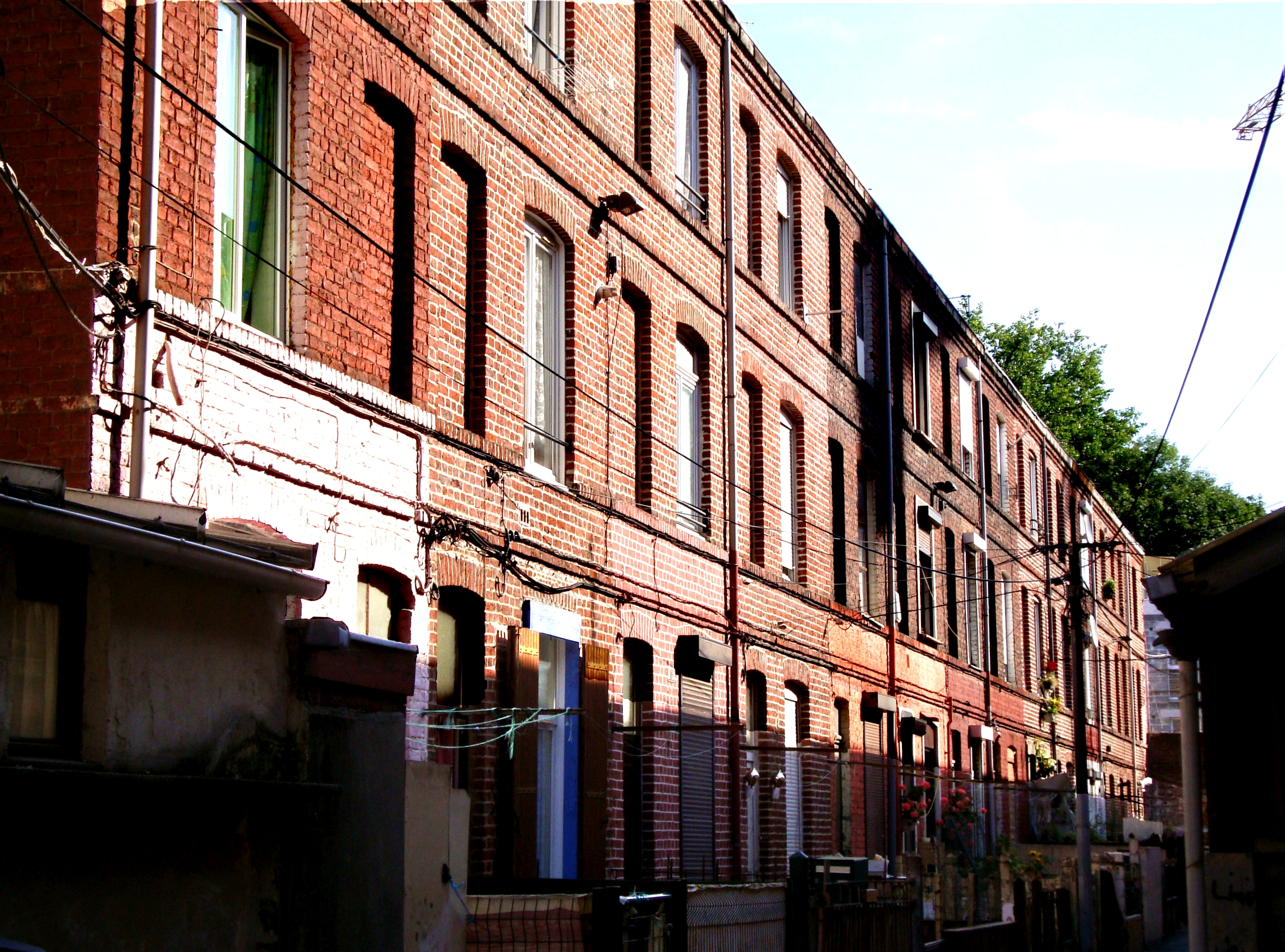 Une courée dans le quartier de Wazemmes à Lille (Nord, France).